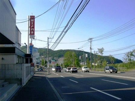 南区の国道230号線